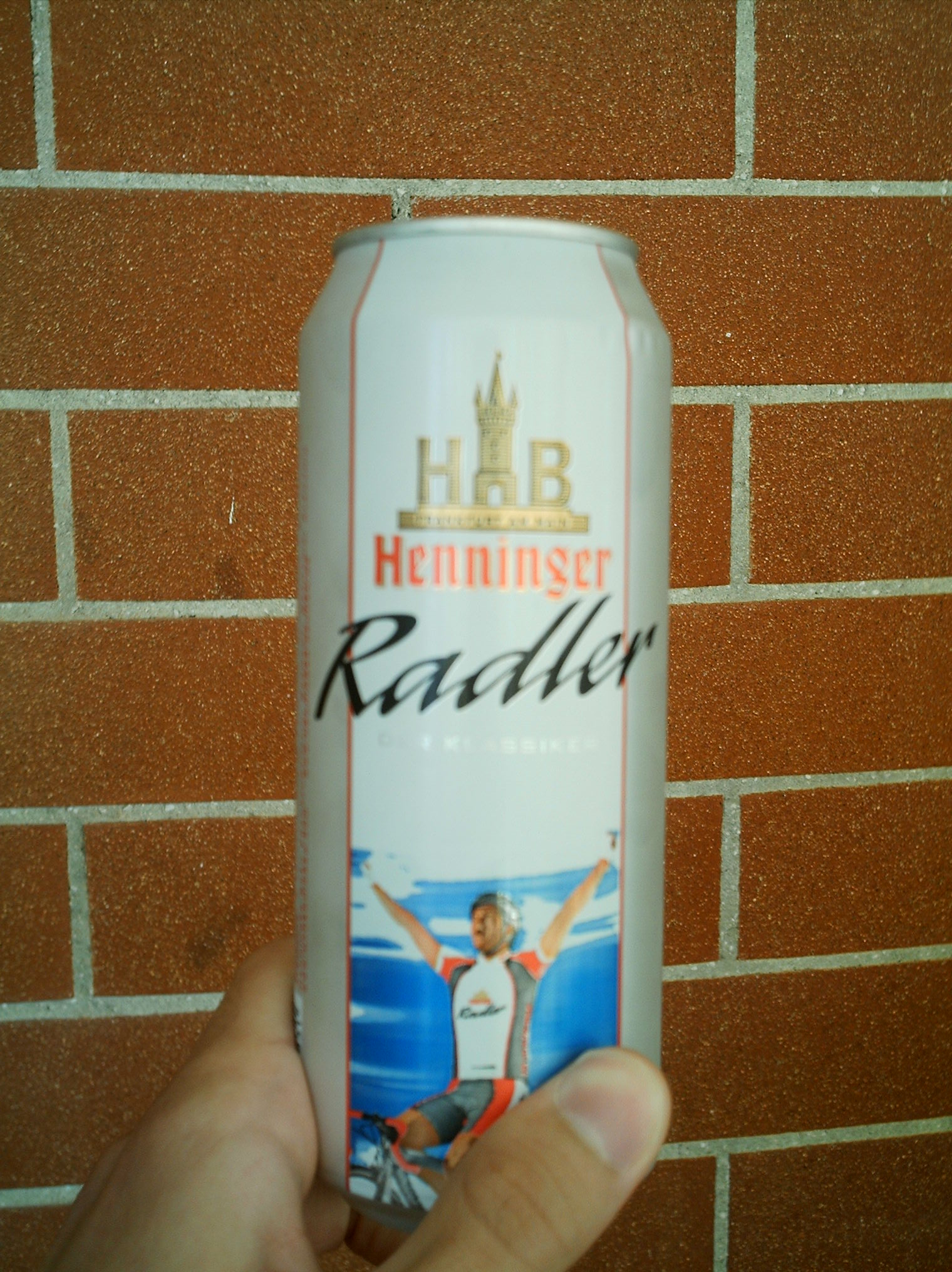 Lattina di radler